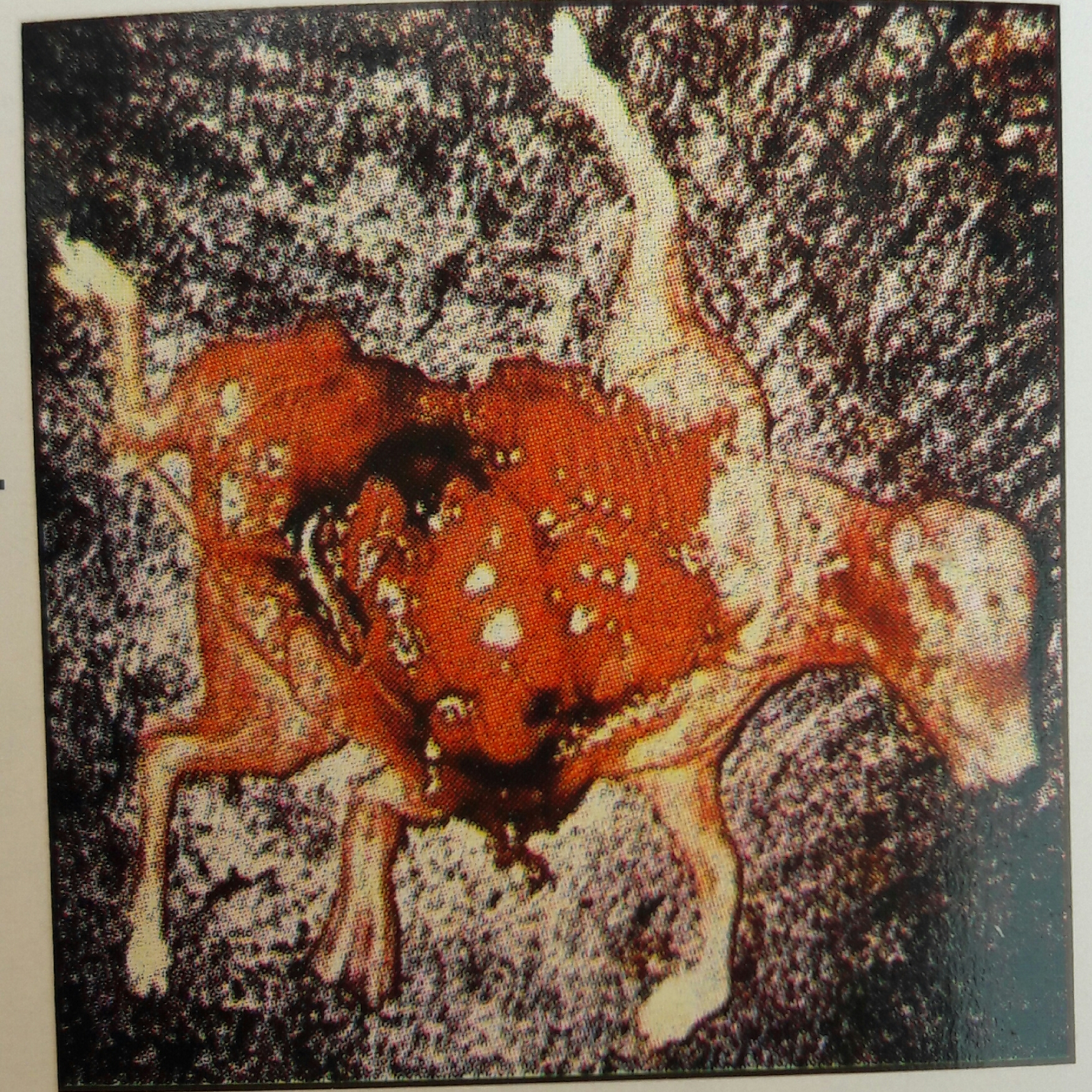 ਪੰਜਾਬੀ: ਸੁੱਟਿਆ ਹੋਇਆ ਫਲ਼